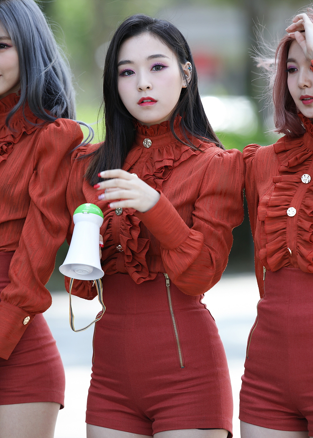 180612 드림캐쳐 유앤아이 막방미니팬미팅